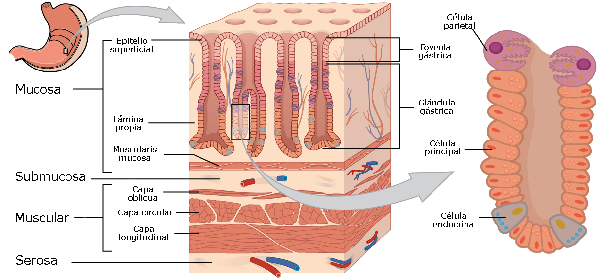 Esquema en el que se muestra la estructura microscópica de la pared del estómago y las principales células que la componen.